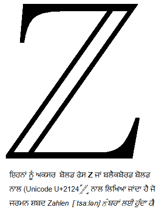 ਪੰਜਾਬੀ: ਪੂਰਨ ਅੰਕਾ ਦਾ ਸੈੱਟ ਸਿਫਰ (0), ਕੁਦਰਤੀ ਨੰਬਰਾਂ (1,2,3,…), ਜਿਹਨਾਂ ਨੂੰ ਸੰਪੂਰਣ ਨੰਬਰ ਜਾਂ ਗਿਣਤੀ ਵਾਲੇ ਨੰਬਰ ਵੀ ਕਹਿੰਦੇ ਹਨ, ਅਤੇ ਇਹਨਾਂ ਦੇ ਜੋੜ-ਇਨਵਰਸਾਂ (ਨੈਗੈਟਿਵ ਪੂਰਨ ਅੰਕਾਂ ਯਾਨਿ ਕੀ -1, -2-, -3, …)ਤੋਂ ਬਣਦਾ ਹੈ। ਇਹਨਾਂ ਨੂੰ ਅਕਸਰ ਬੋਲਡ ਫੇਸ Z ਜਾਂ ਬਲੈਕਬੋਰਡ ਬੋਲਡ ਨਾਲ (Unicode U+2124 ℤ) ਨਾਲ ਲਿਖਿਆ ਜਾਂਦਾ ਹੈ ਜੋ ਜਰਮਨ ਸ਼ਬਦ Zahlen ([ˈtsaːlən] ਨੰਬਰਾਂ ਲਈ ਹੁੰਦਾ ਹੈ। ℤ , ਰੇਸ਼ਨਲ ਅਤੇ ਵਾਸਤਵਿਕ ਨੰਬਰਾਂ ਦਾ ਇੱਕ ਸਬਸੈੱਟ ਹੁੰਦਾ ਹੈ, ਅਤੇ ਕੁਦਰਤੀ ਨੰਬਰਾਂ ਵਾਂਗ , ਅਨੰਤ ਗਿਣਤੀ ਤੱਕ ਗਿਣਿਆ ਜਾ ਸਕਦਾ ਹੈ।